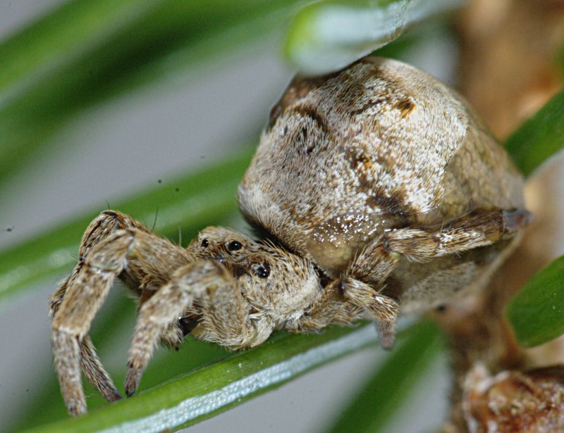 Hyptiotes paradoxus (Uloboridae, Araneae)